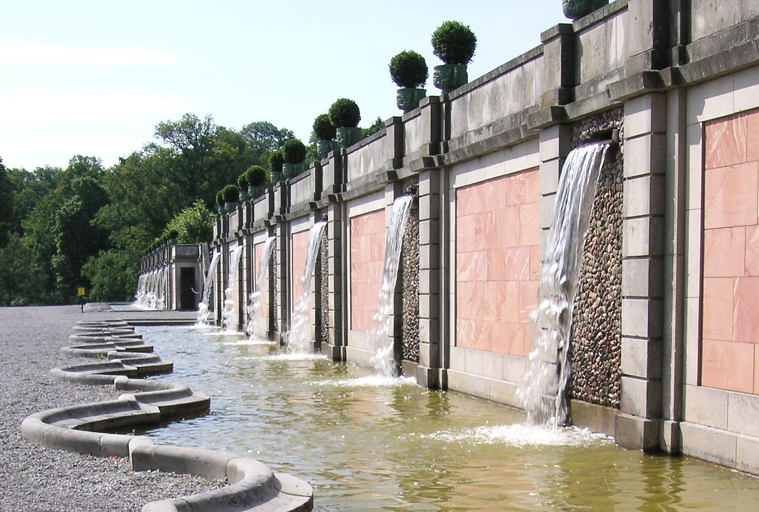 Drottningholms kaskader